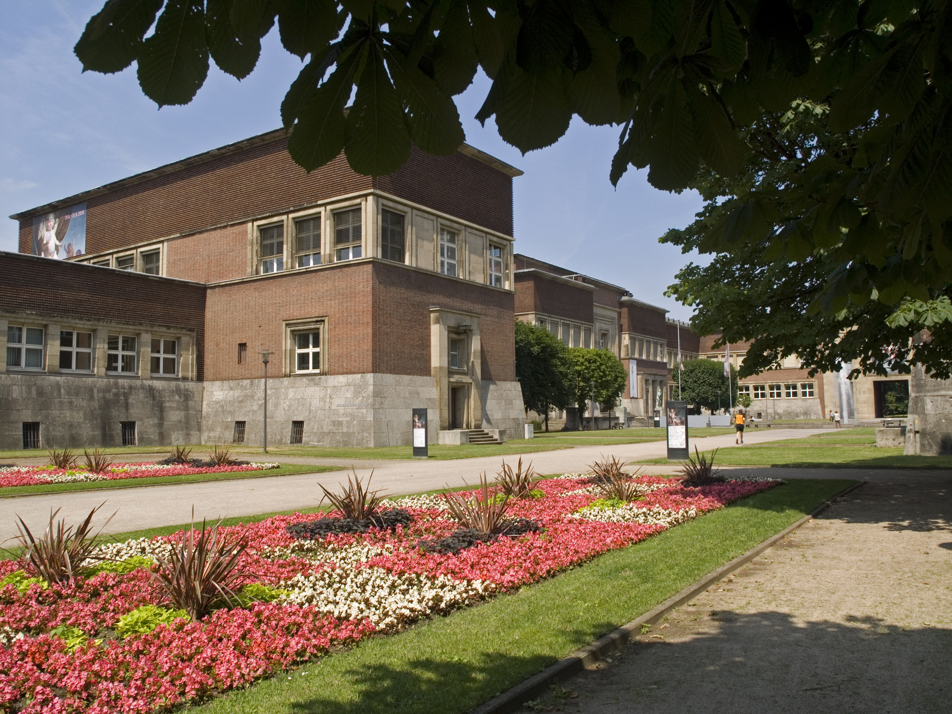 Северный Рейн - Вестфалия, Дюссельдорф. Ehrenhof-Kunstmuseum